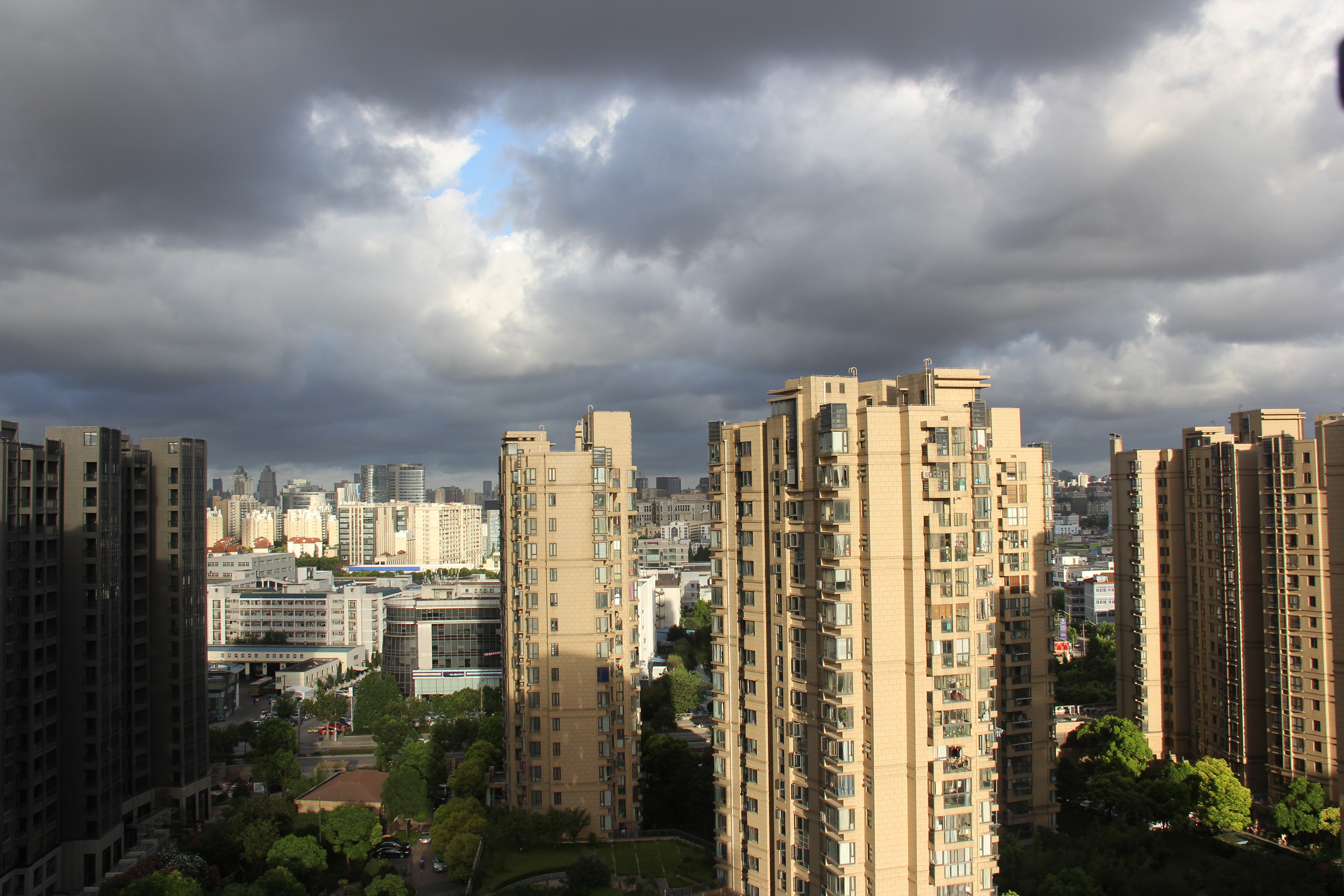 拍摄点：上海金沙雅苑44号